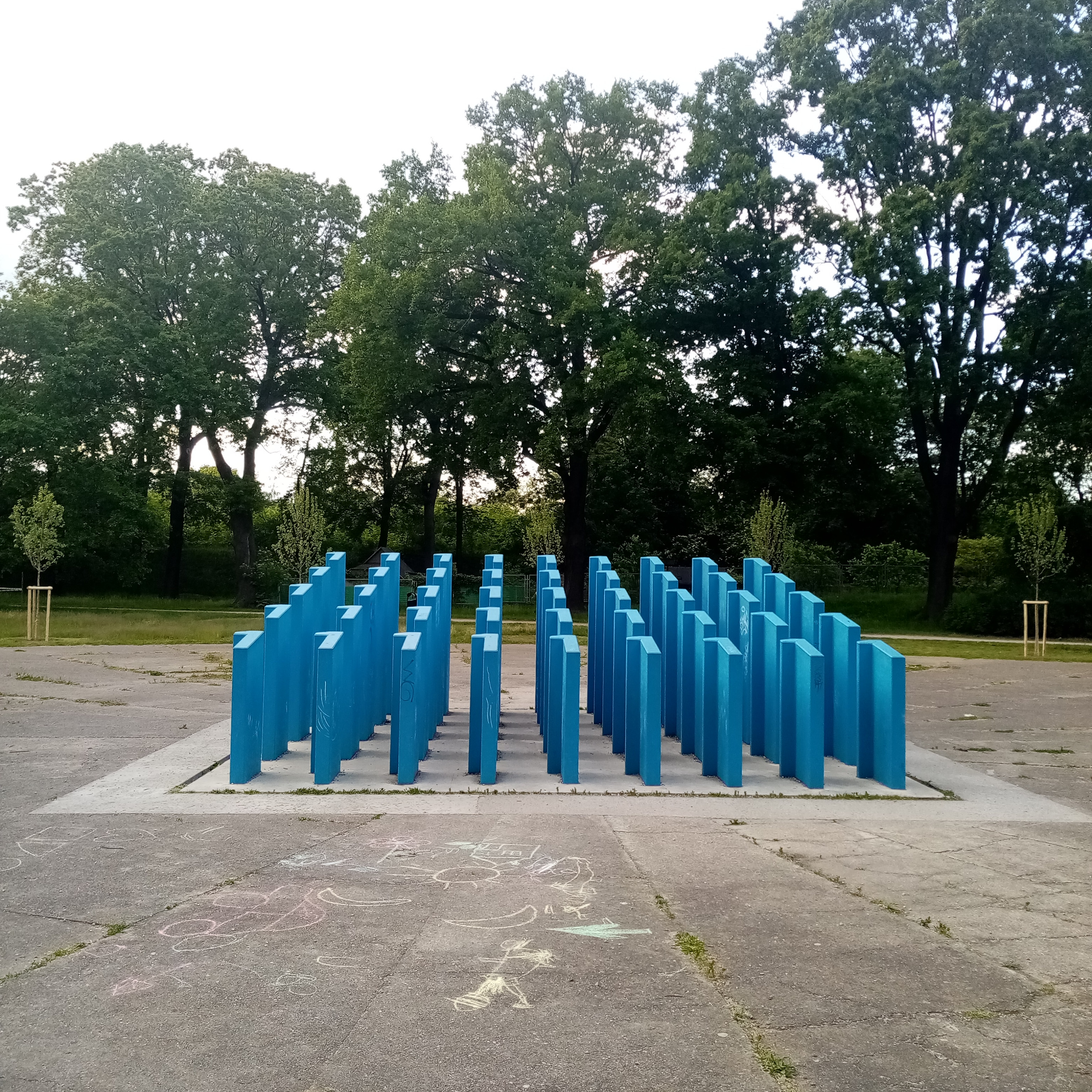 O pracy Barbary Kozłowskiej – artystki konceptualnej, przedstawicielki kierunku w sztuce zwanego neoawangardą, zaangażowanej nie tylko w twórczość artystyczną, ale też naukową, nie można opowiadać bez wspomnienia o Stanisławie Dróżdżu – twórcy poezji konkretnej i bez użycia terminu „pojęciokształty”. Kozłowska współpracowała z poetą przy nadaniu jego utworom graficznego odwzorowania, a prace te nazywała „poezjografią”. Instalacja w parku Popowickim to trójwymiarowa forma, którą artystka nadała tekstowi stworzonemu przez autora. Jest to rodzaj interpretacji, pomysłu na przeniesienie poezji w formę rzeźby. Projekt instalacji powstał z okazji Sympozjum Plastycznego Wrocław ’70 w roku 1970, jednak dopiero w 2017 roku, po obchodach Europejskiej Stolicy Kultury we Wrocławiu, udało się go zrealizować. W przestrzeni Wrocławia jest jeszcze więcej realizacji związanych z poezją Dróżdża.